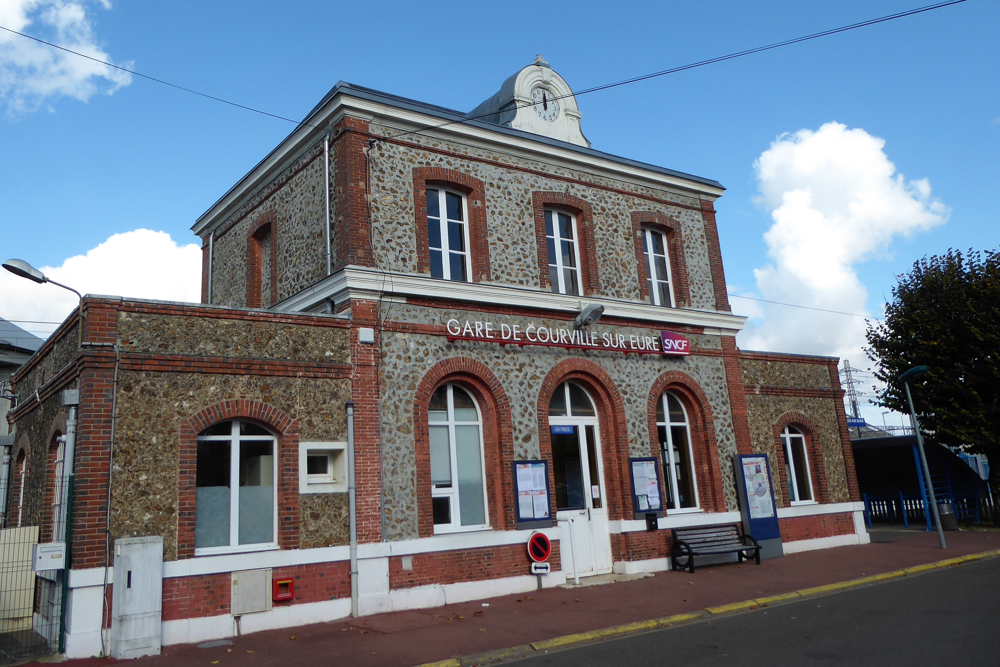 gare de Courville-sur-Eure, Eure-et-Loir, France.